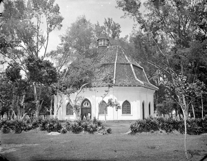 Negatief. Onder de VOC was het bekeren van de bevolking van de Indische Archipel niet iets waar de Heren XVII of de 'Hoge Regering' te Batavia zich druk over maakten. Er werd vooral geprobeerd om die bewoners van de Molukken, die door de Portugezen tot het katholicisme bekeerd waren, tot het protestantisme over te halen of althans ze ervan te weerhouden moslim te worden. Protestantse kerken waren er er wel in enkele grote steden zoals Batavia, maar daarbuiten niet. In de 19e eeuw komen er in Nederland diverse zendingsgenootschappen die in Indië actief waren, teneinde moslims en 'heidenen' (zij die noch moslim noch christen zijn) te bekeren. Later in de 19e eeuw komt daar ook de RK missie bij. Op Java werden zending en missie relatief laat actief, omdat de overheid bang was voor protesten van islamitische kant. (P. Boomgaard, 2001). Kerk te Rembang, Midden Java